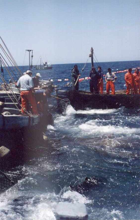 Inicio de la levantá. Cerrando el cerco (Almadraba de Barbate)